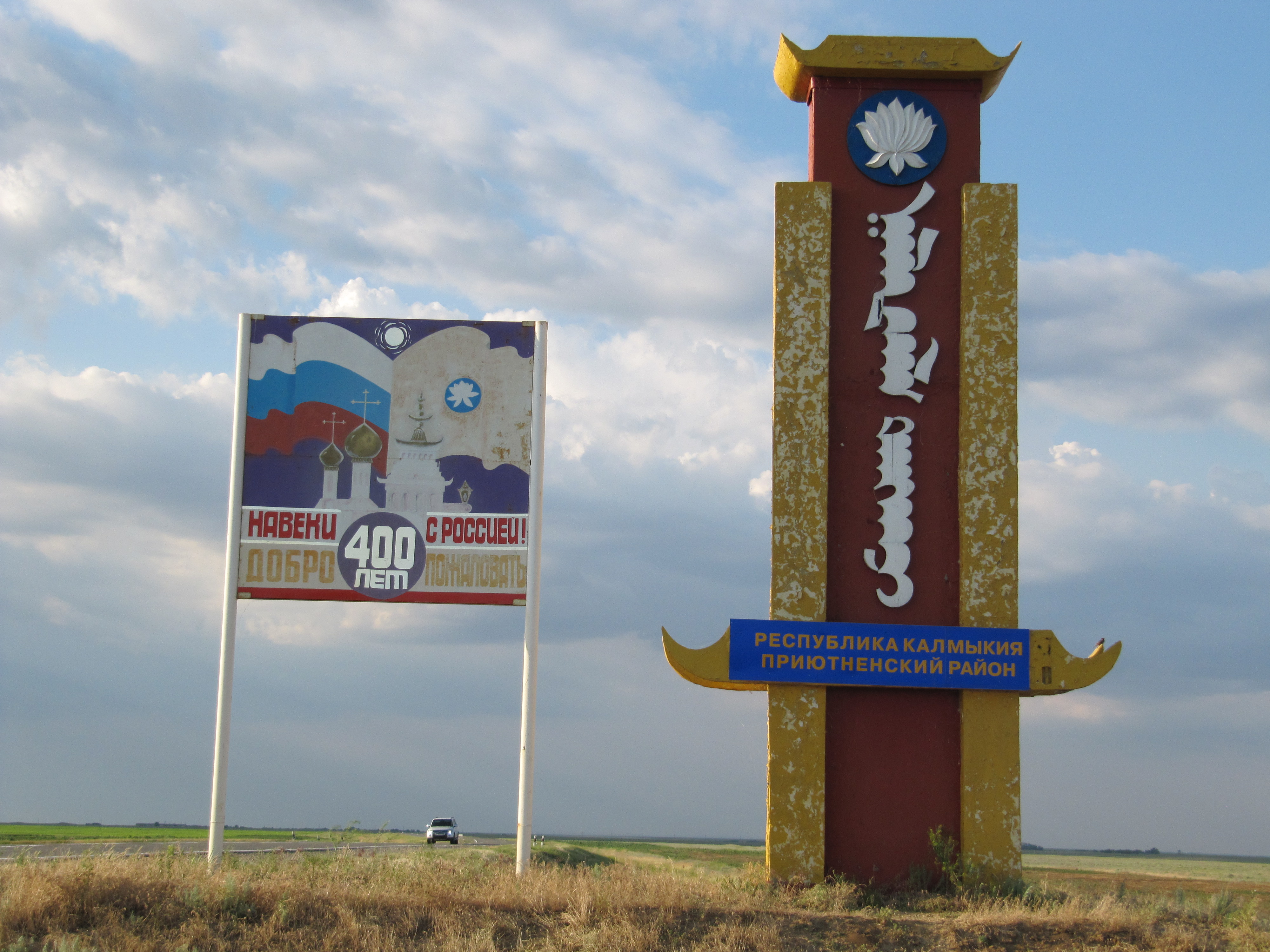 Дорожный указатель на въезде в Калмыкию со стороны Ипатово, Ставропольский край